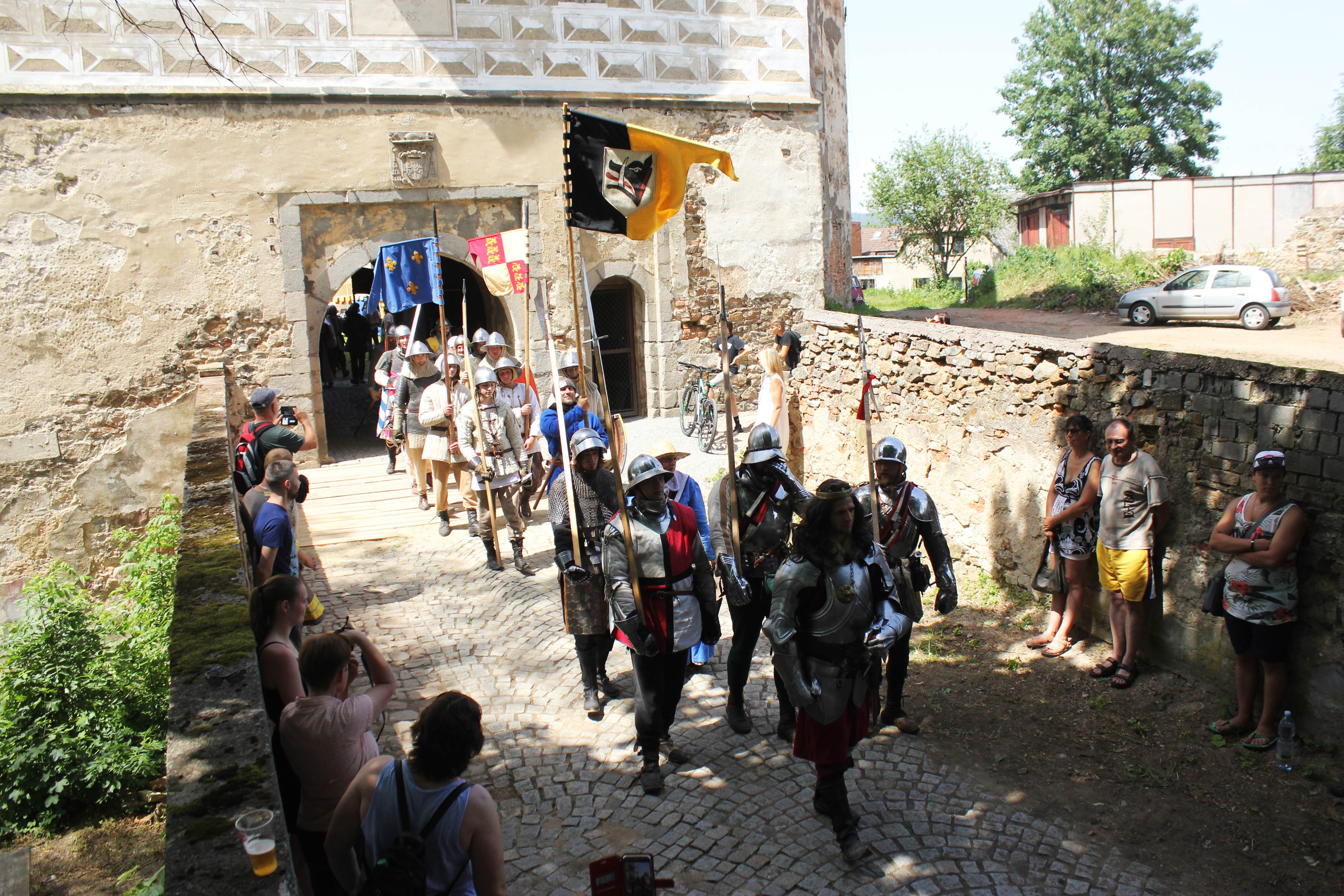 Slavnost královny Johanky, Rožmitál pod Třemšínem 2019